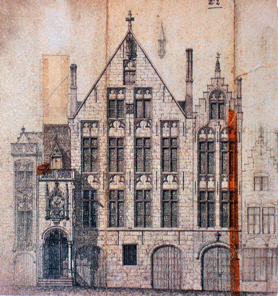 Het tolhuis, Jan van Eyckplein in Brugge; Oorspronkelijke tekening door de architect Louis Delacenserie (1838-1909)